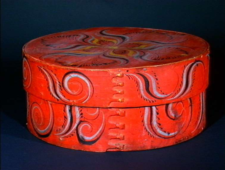 Øskje, ant. fra 2. halvdel av 1800-tallet og dekoret med Vikdalsmaling. Slike øskjer ble produsert i store mengder i Viksdalen i Sogn og Fjordane og solgt rundt i landet. Denne er innkommet til museet fra Flesberg i Numedal. Diameter 40 cm. Foto Anne-Lise Reinsfelt/Norsk Folkemuseum, NF.1921-1622.